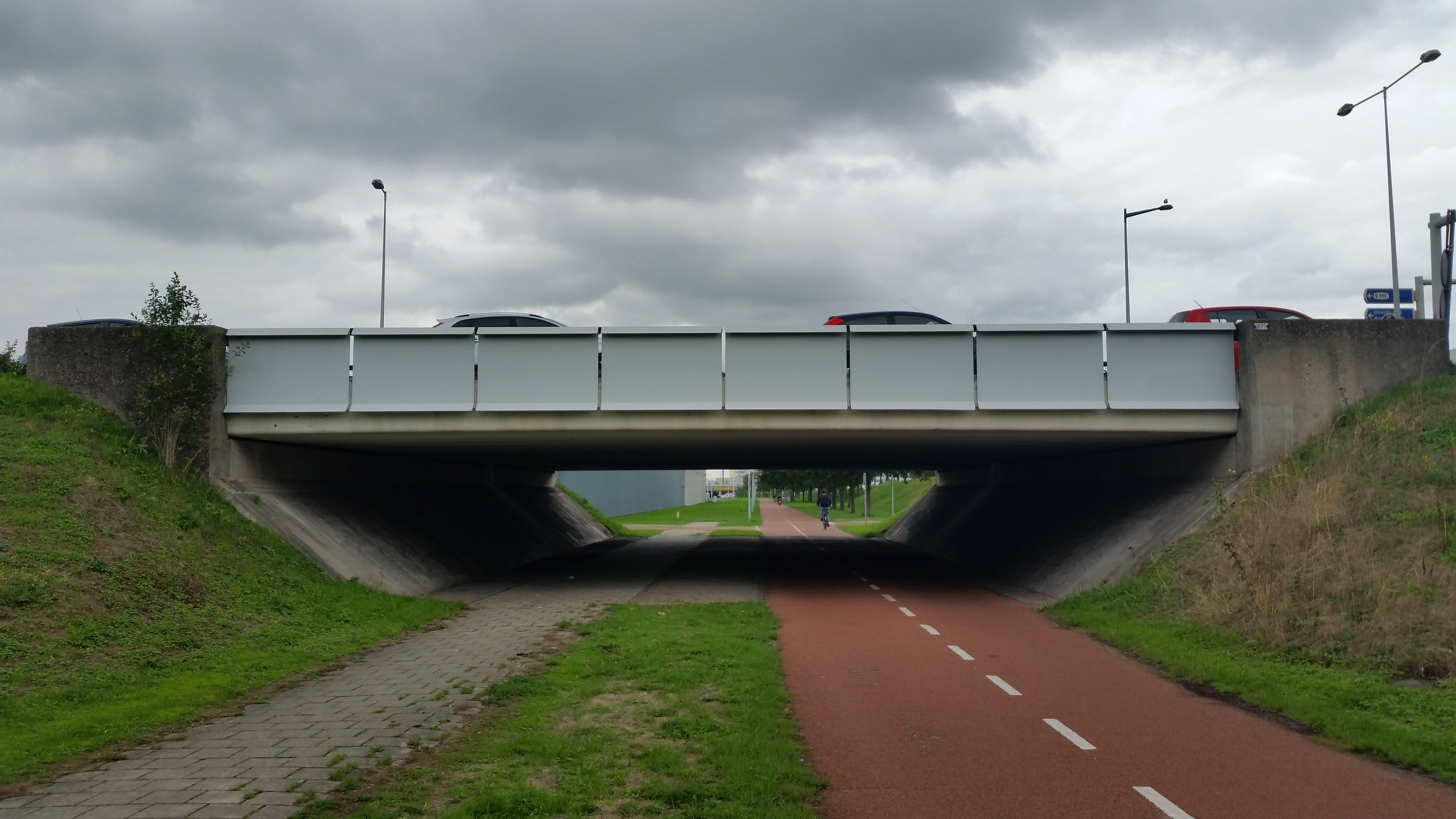 Brug 871, Meibergdreefbrug-West, zijaanzicht